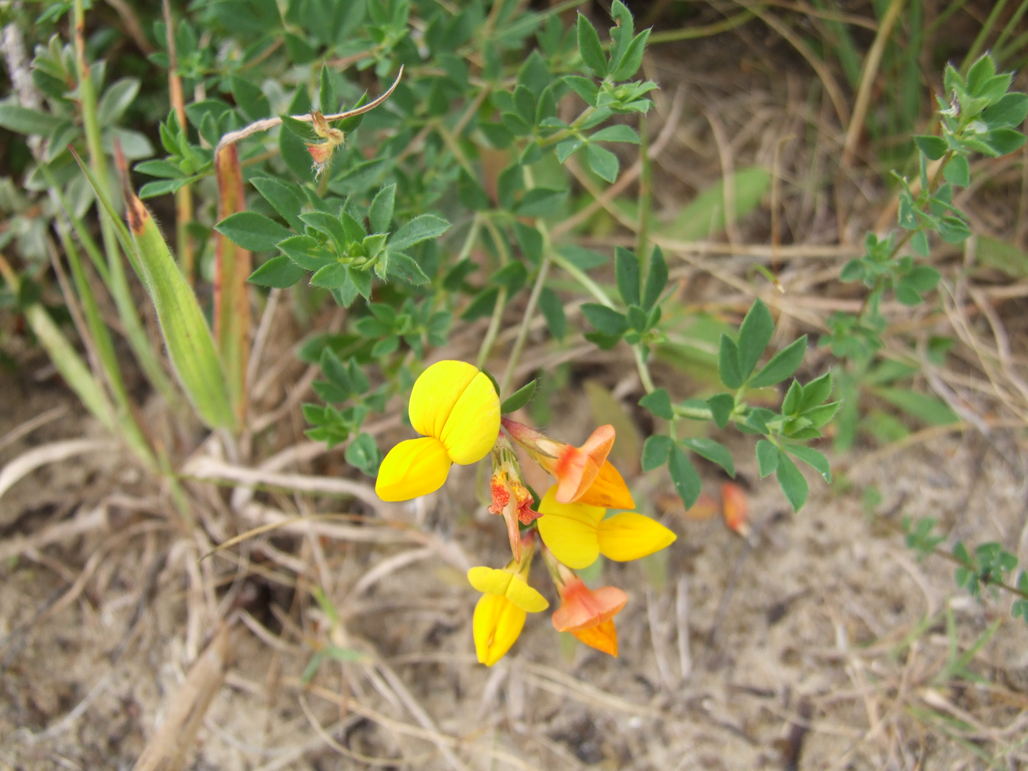 Lotus corniculatus - Gemeiner Hornklee - Le Lotier corniculé - Gewone rolklaver - Bird's foot - trefoil - Ort: Dune du Perroquet, Bray-Dunes, Frankreich - Blüten